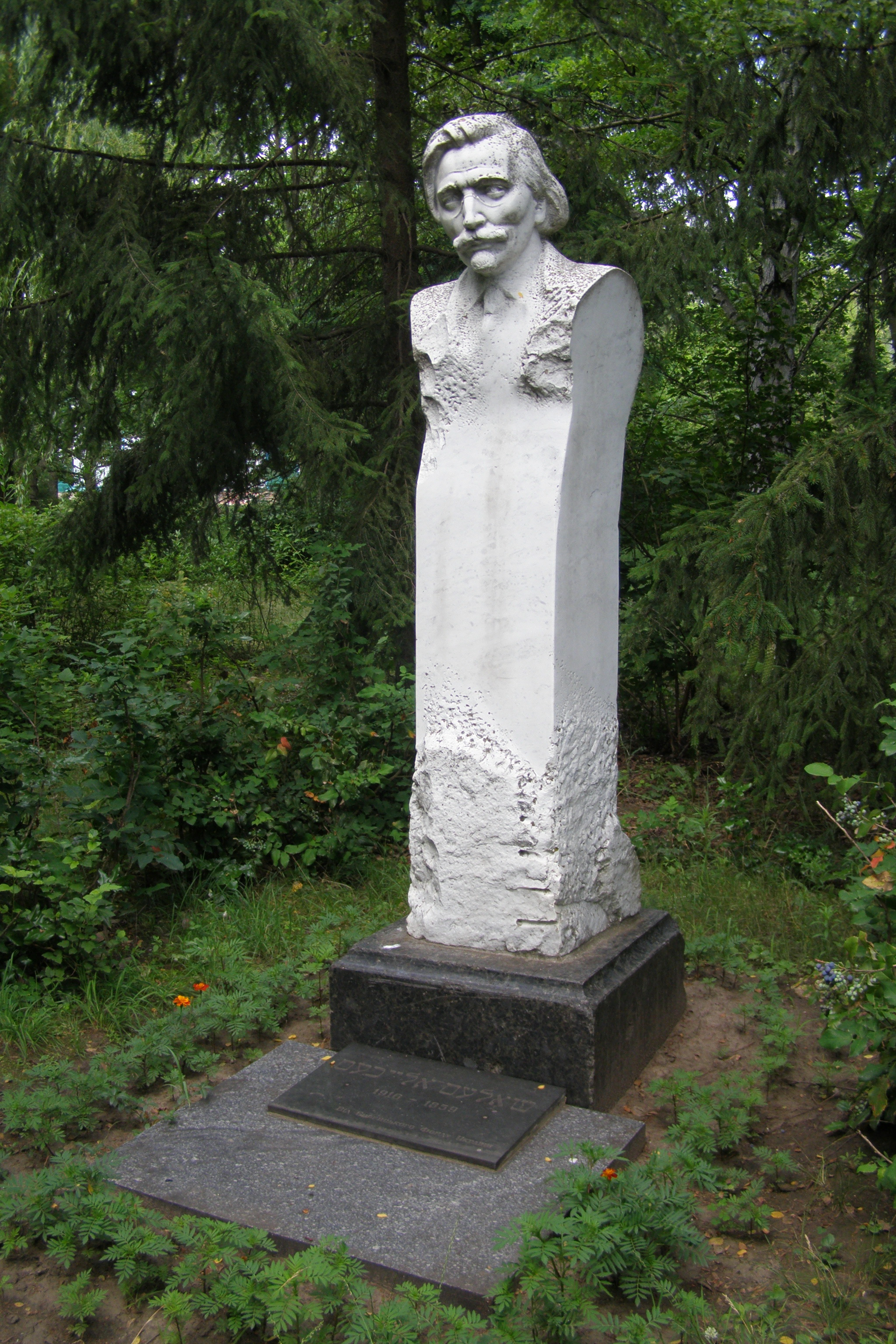 1. Пам’ятник Шолом-Алейхему. Скульптор М. Альтшулер, 80-ті роки ХХ ст., Музей Шолом-Алейхема